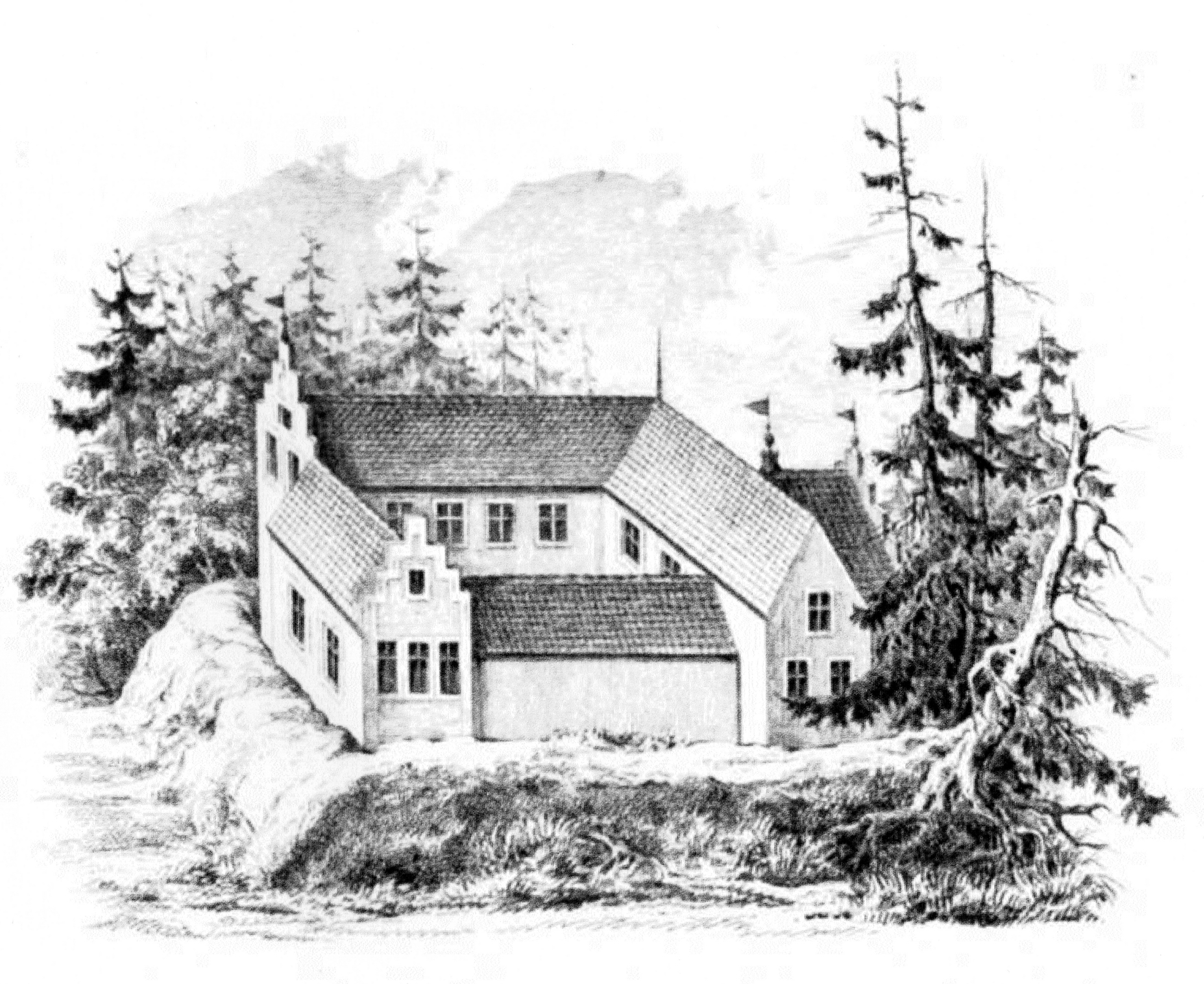 Burg Hanerau vor 1644 , Zeichnung von Köhler und Roisternitz 1862